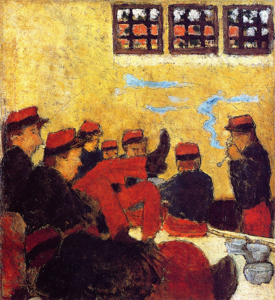 Paintings by Pierre Bonnard